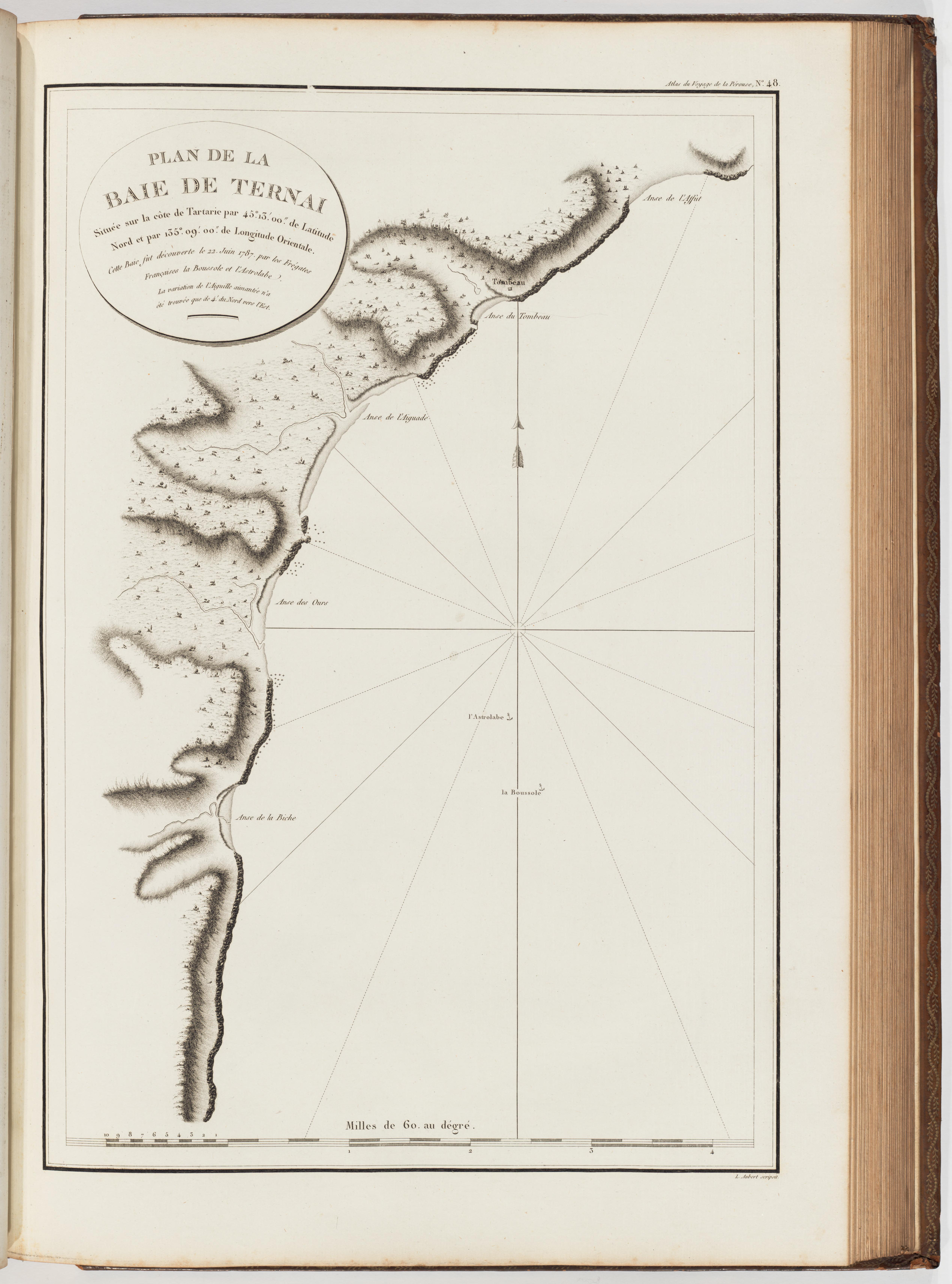 Voyage de La Pérouse autour du monde /publié conformément au décret du 22 avril 1791, et rédigé par L.A. Milet-Mureau.